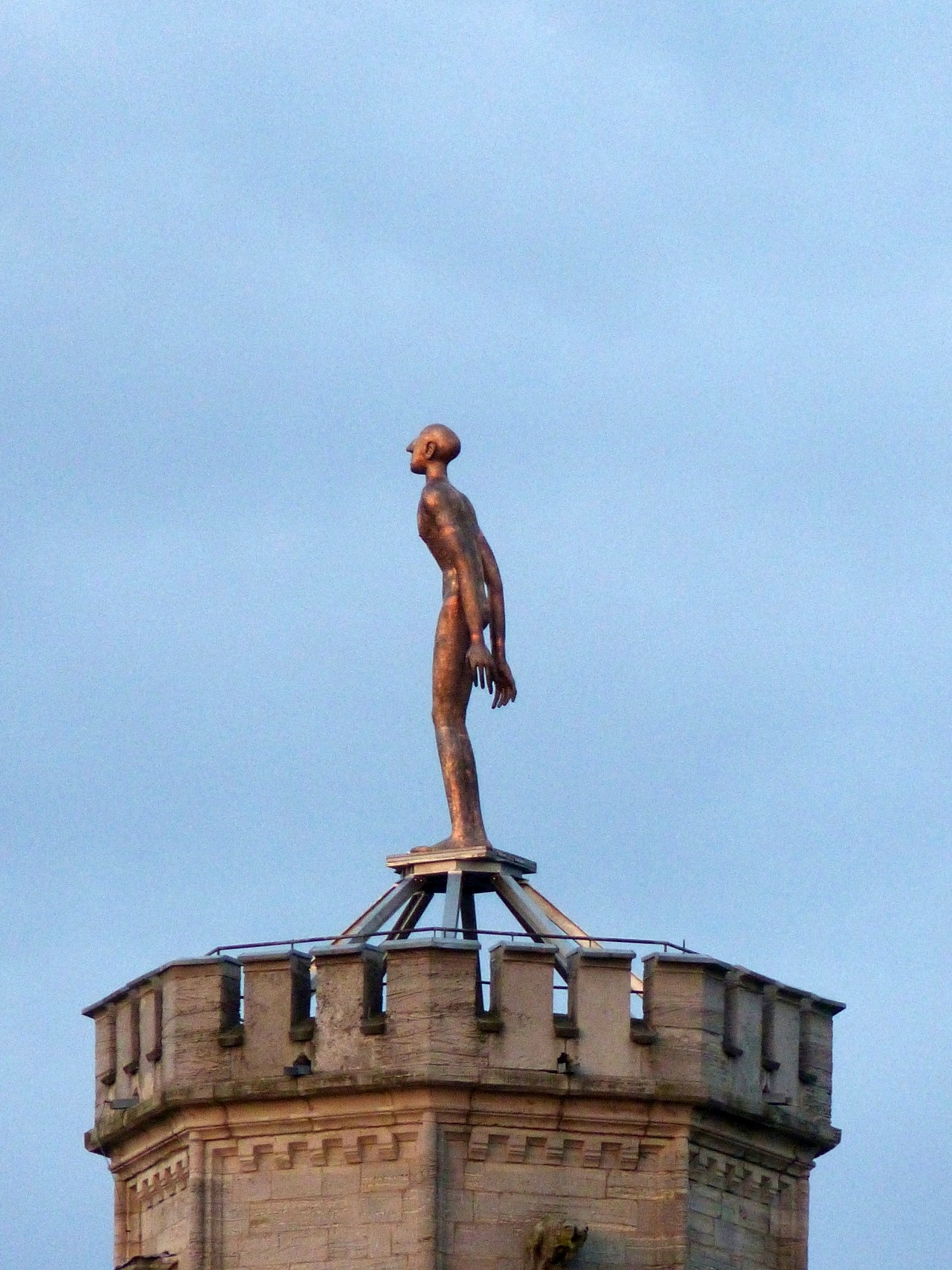 Türmerfigur auf dem ehemaligen Wasserwerk Bürgerpark im August 2014 von Westen.